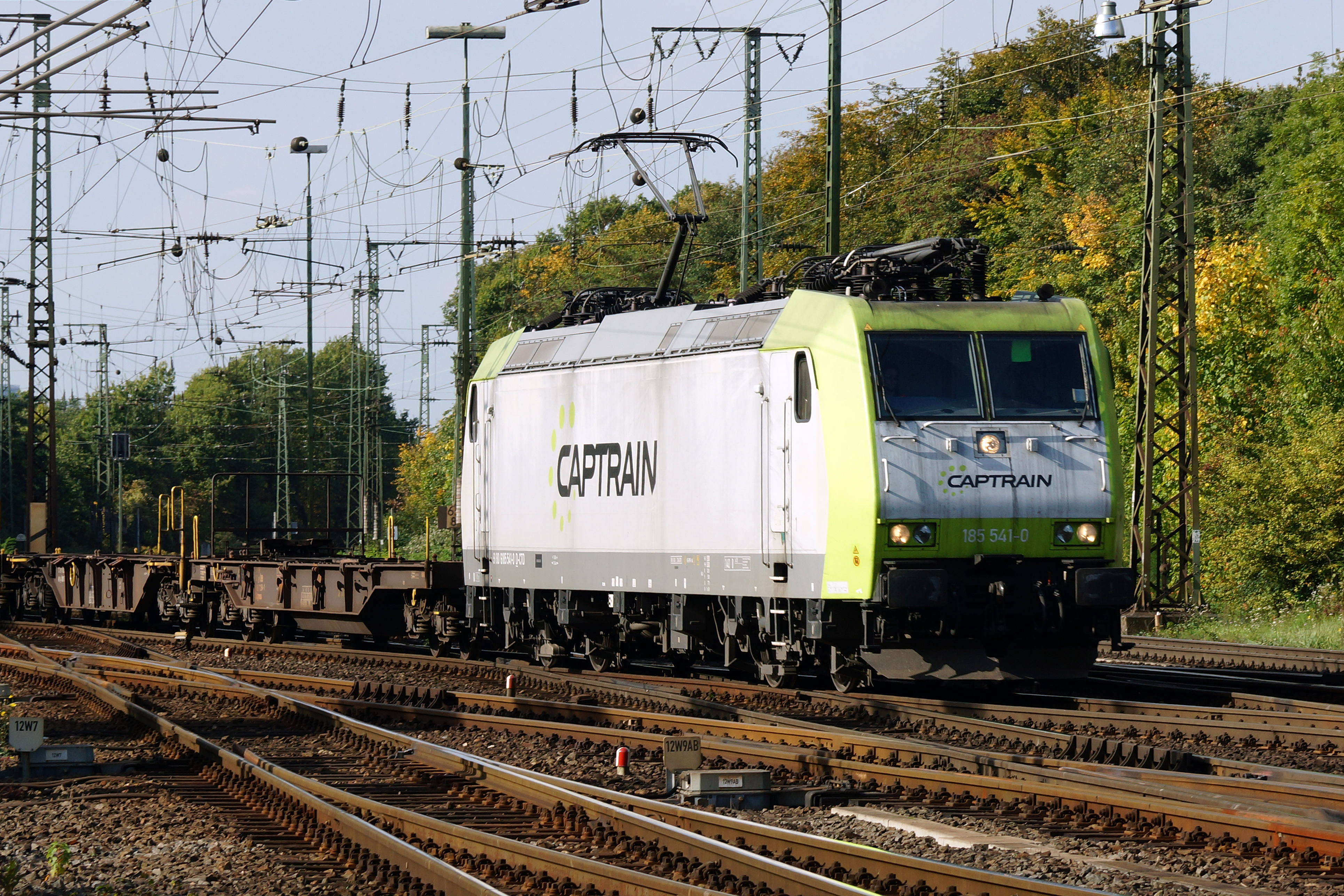 Captrain 185 541-0 in der Nähe vom Rangierbahnhof Gremberg.